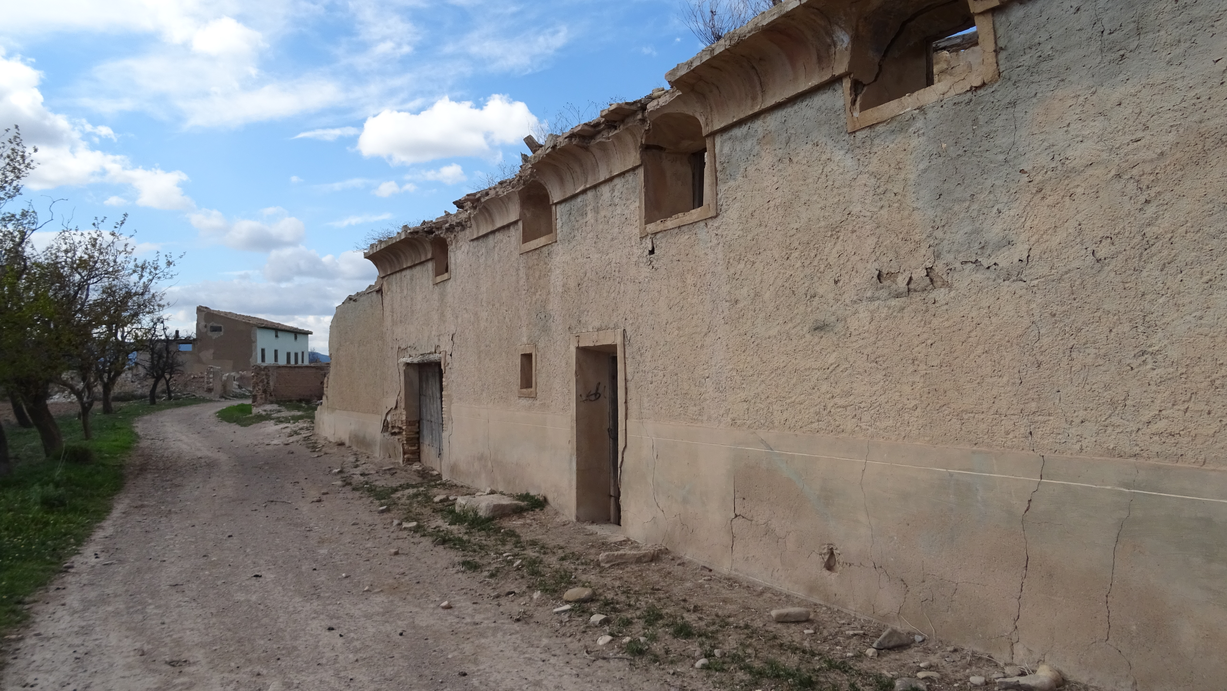 Aragonés: carrera Armingol en Ganyarul